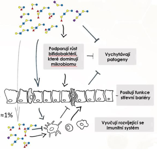 Vytvořeno a upraveno dle: Rudloff S, Kunz C. : Milk Oligosaccharides and Metabolism in Infants. Adv. Nutr. 2012; 3: 398S–405S.